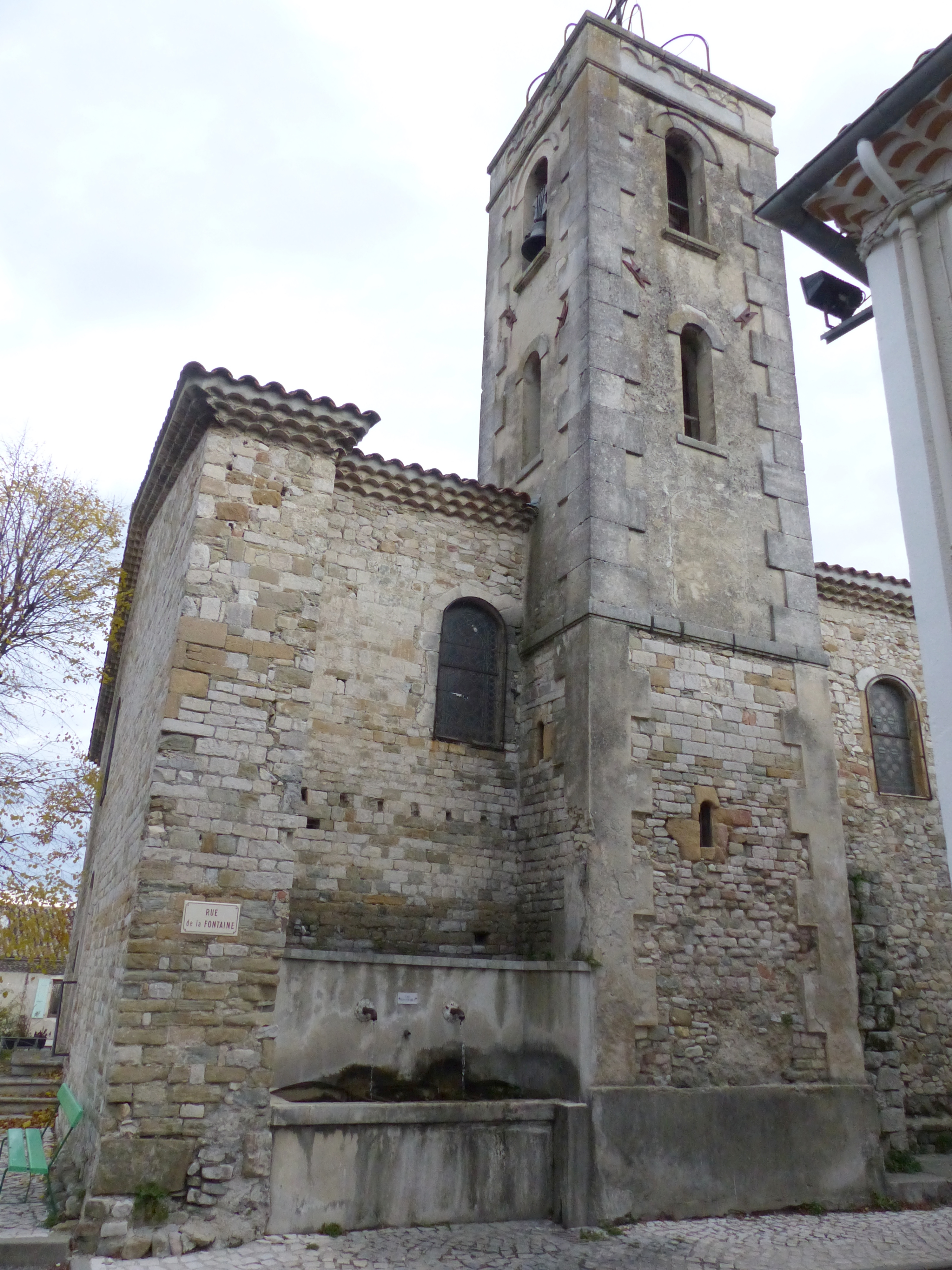 Charols (Drôme, France), dans la plaine des Andrans, église St Jean-Baptiste, extérieur. Commencée au IXe siècle, elle serait une des deux plus anciennes églises du département.